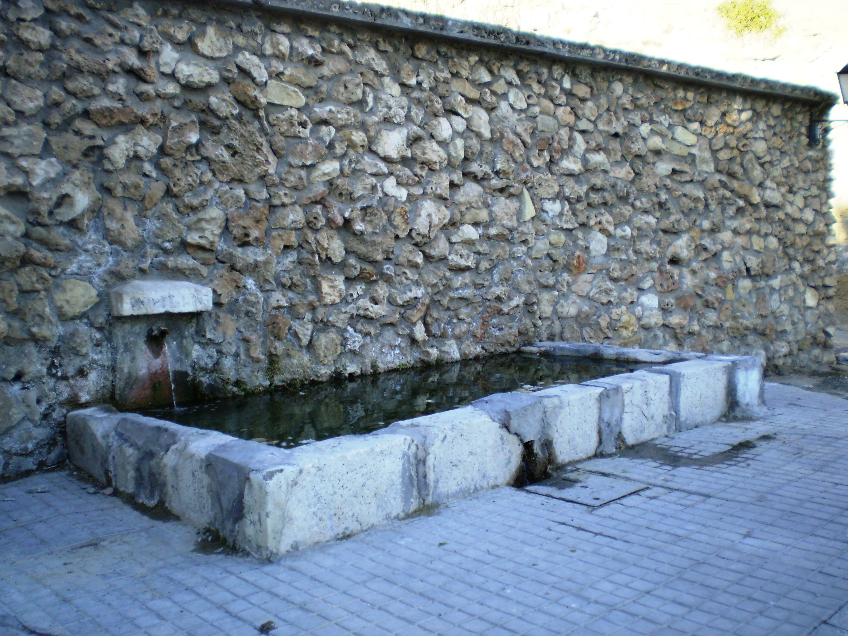 Fuentidueña de Tajo Fountain, Community of Madrid, Spain